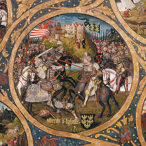 Adalbert im Kampf gegen die Ungarn, im Hintergrund Melk, Babenberger Stammbaum, um 1490, Stift Klosterneuburg.